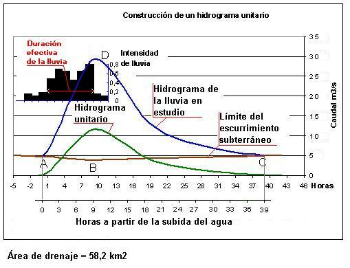 Ilustración para el cálculo del hidrograma unitario Autor: Alfredobi Junio 2006